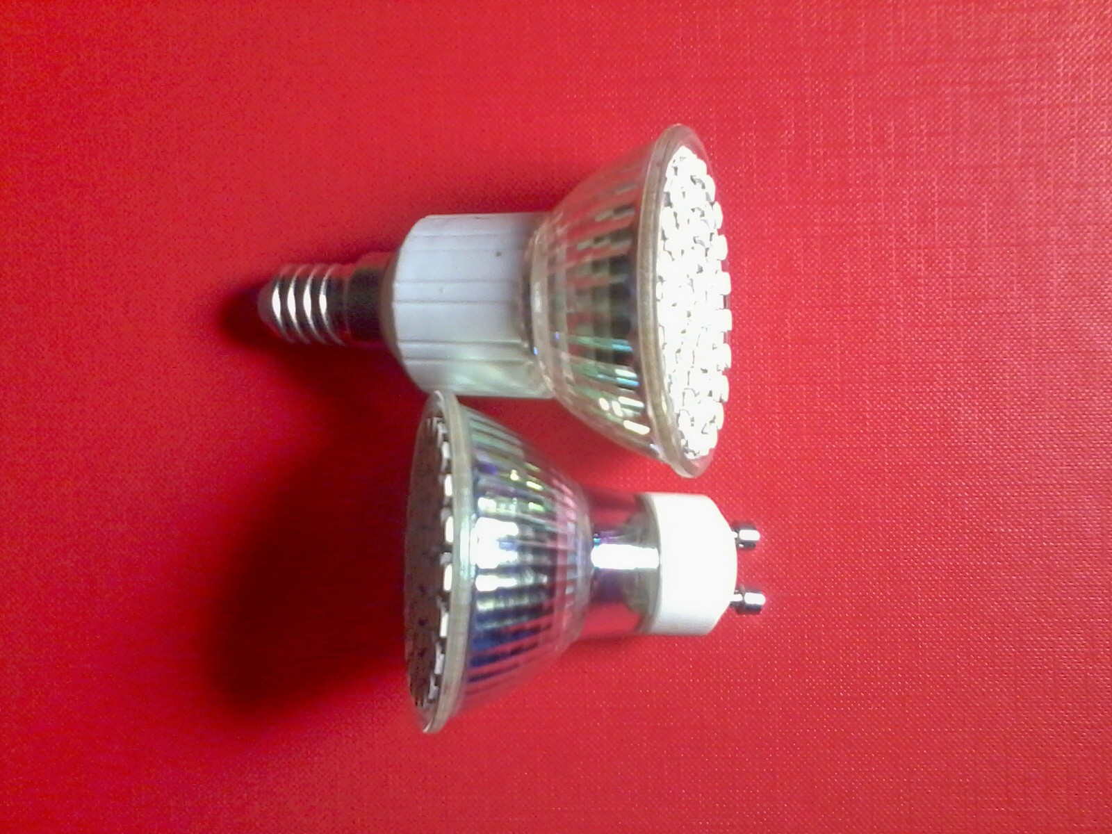 Знято мобілкою Самсунг